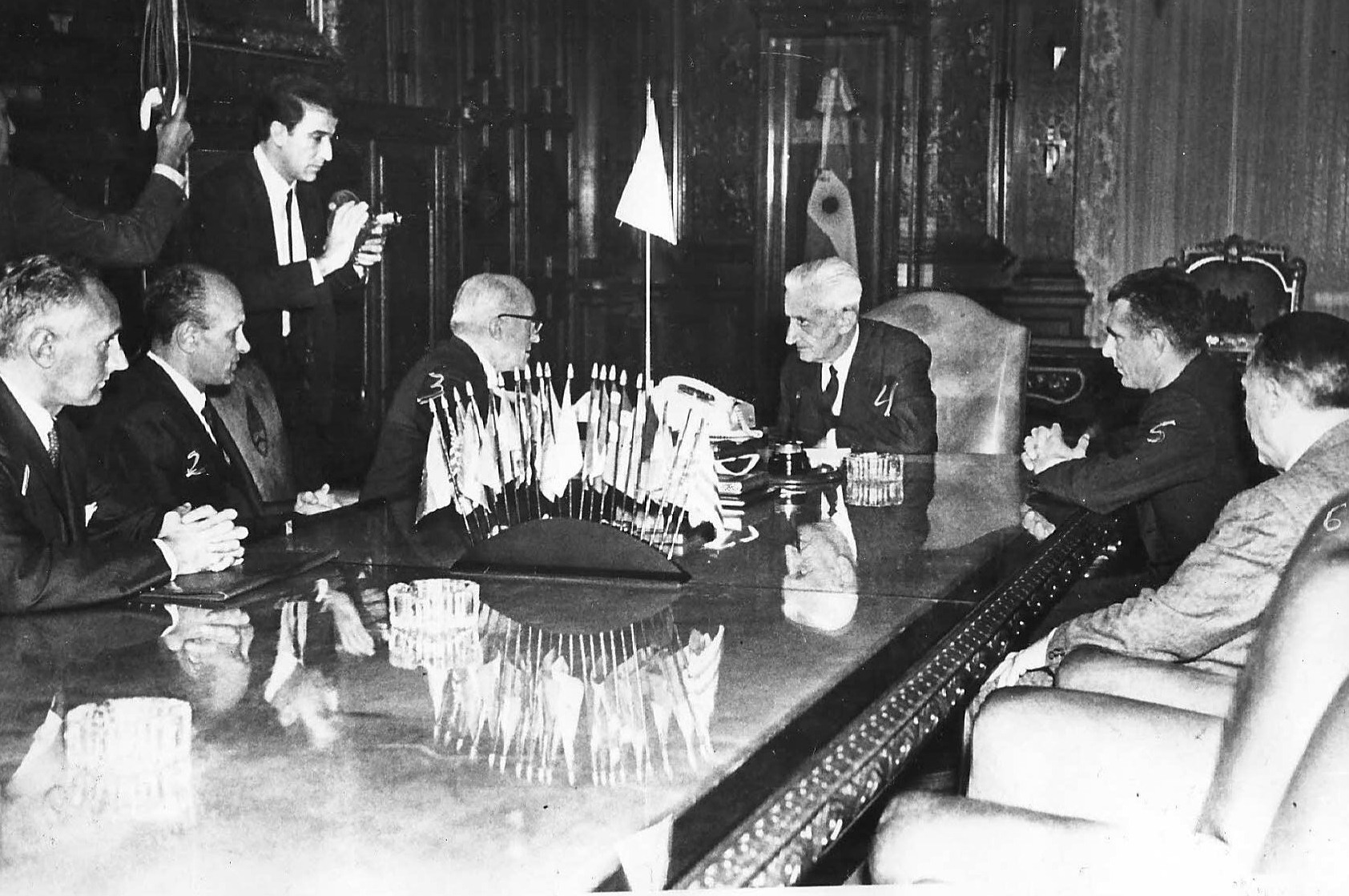 Agostino Rocca y colaboradores de Techint, reunidos con el presidente de la Nación, Dr. Arturo Umberto Illia en la Casa Rosada (1966).